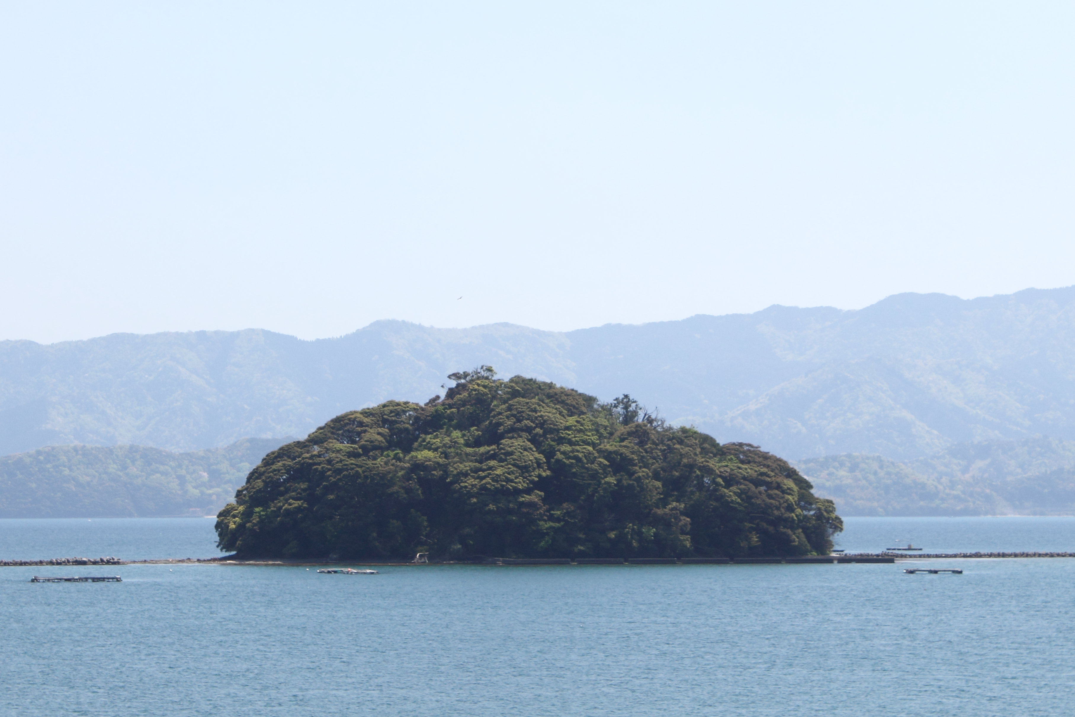 大島半島の日角浜沖に浮かぶ無人島 冠者島